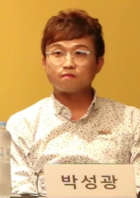 (TV10) 사이다 김영철=이영자는 자웅동체